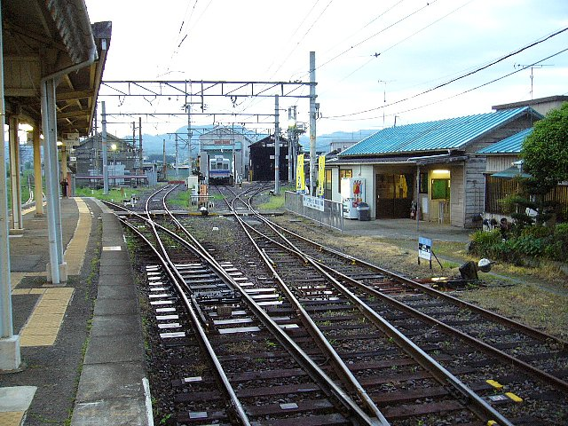 和歌山電鐵 伊太祈曽駅 駅構内 中央奥が車両基地、右の青屋根が駅舎、左手へ伸びるのが貴志への線路